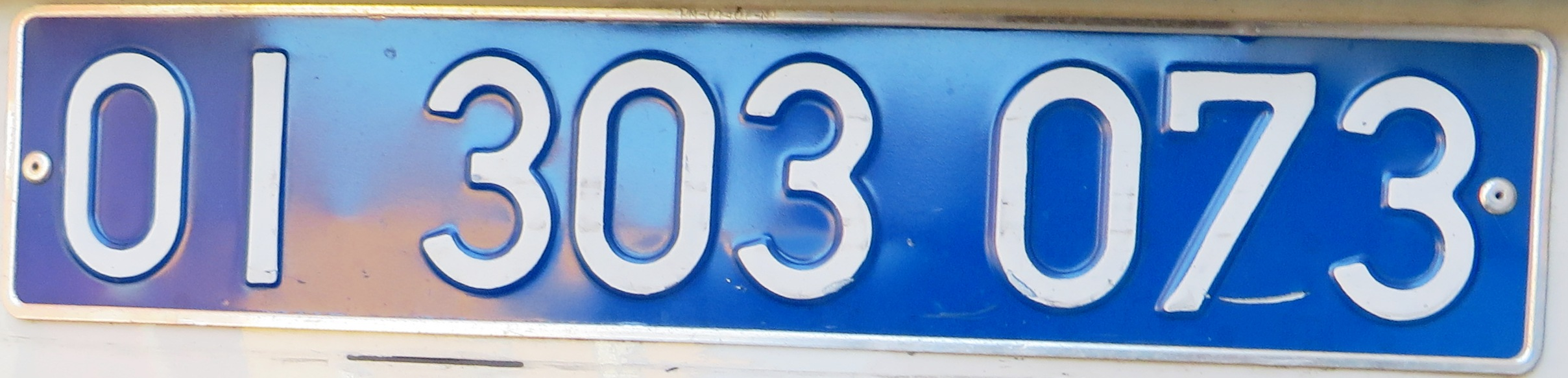 Spanje kentekenplaat blauw